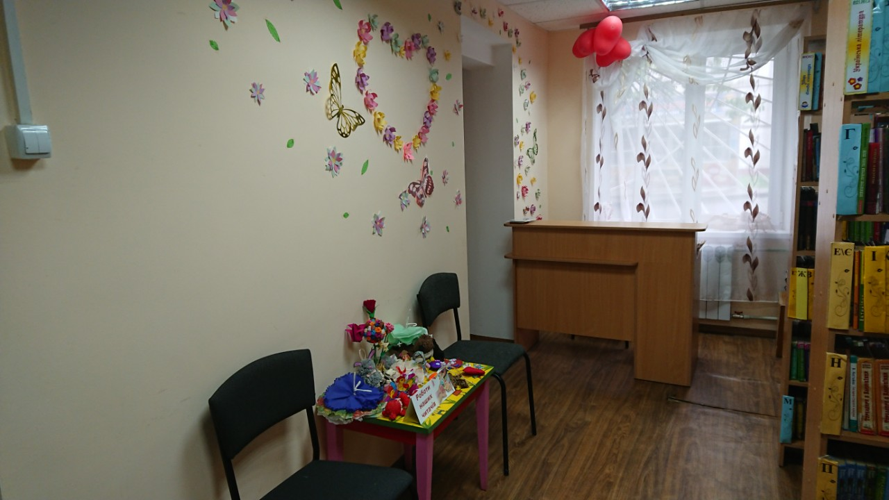 Вироби читачів, подарованих для бібліотеки